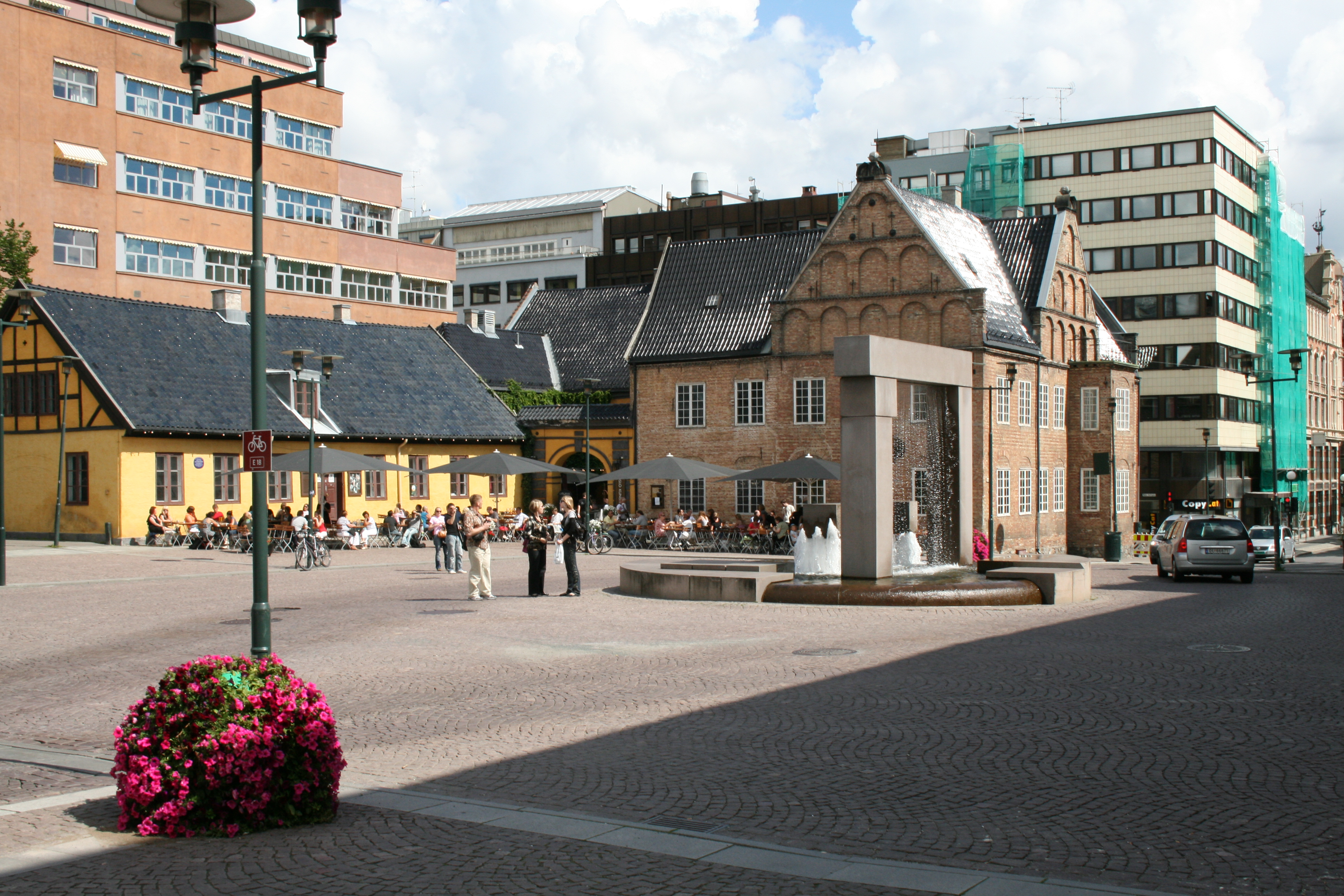 Christiania Torv i Oslo.